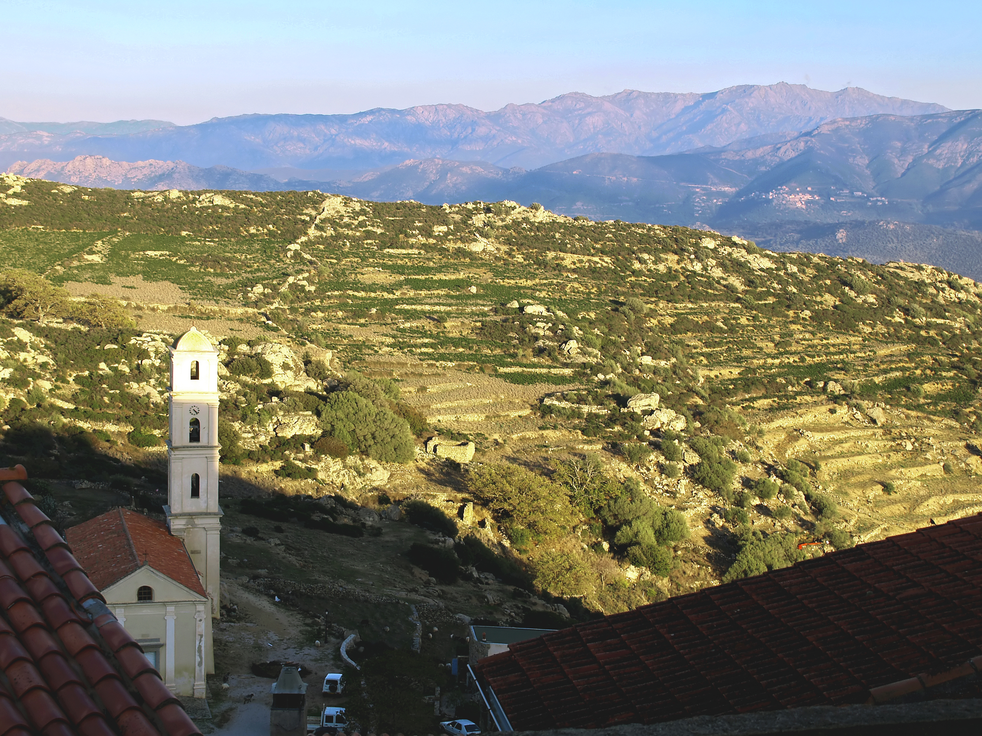 Sant'Antonino - Panorama depuis le haut du village